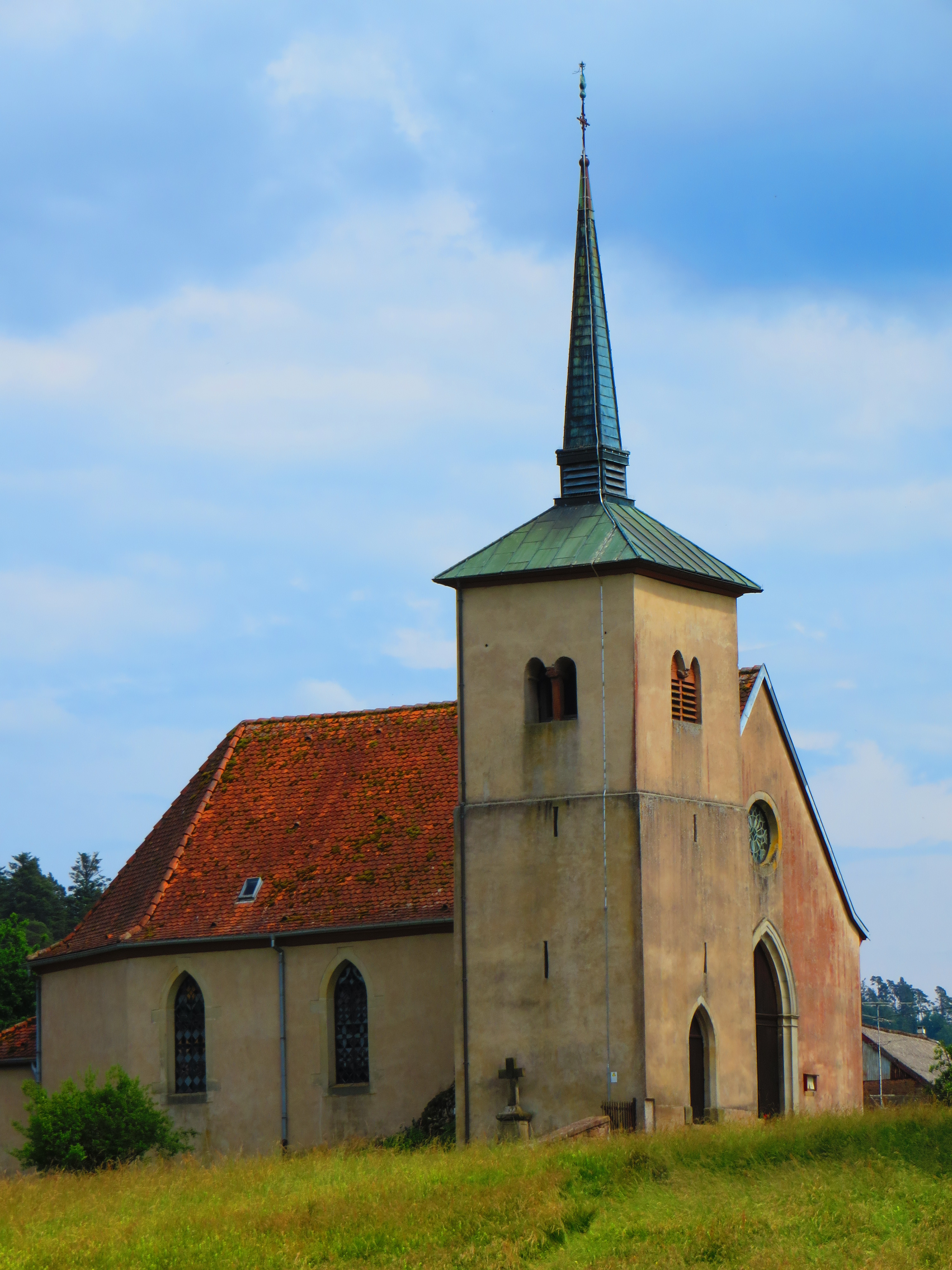 Lafrimbolle eglise